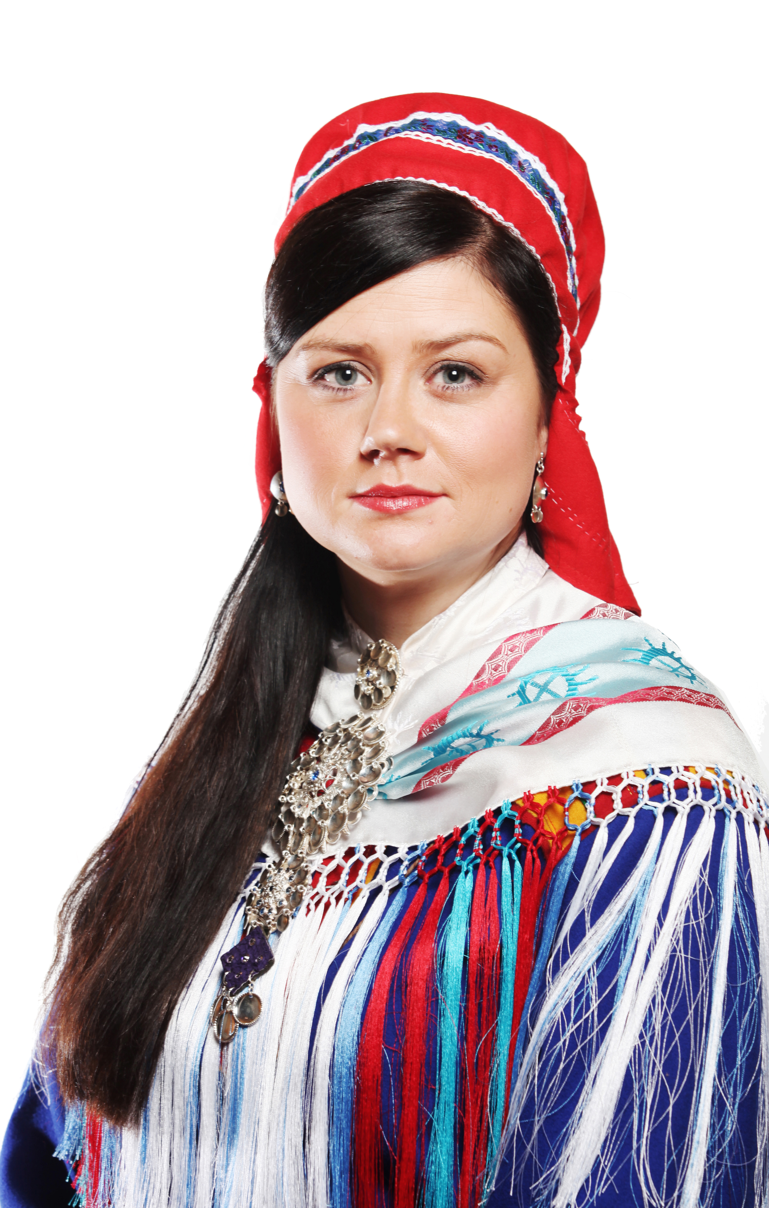 Medlem av næring- og kulturkomitéen. Foto: Kenneth Hætta / Sametinget.